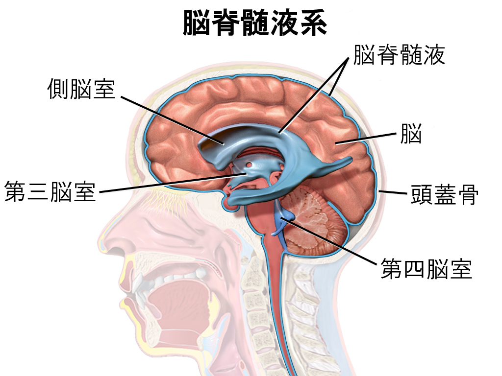 脳脊髄液系